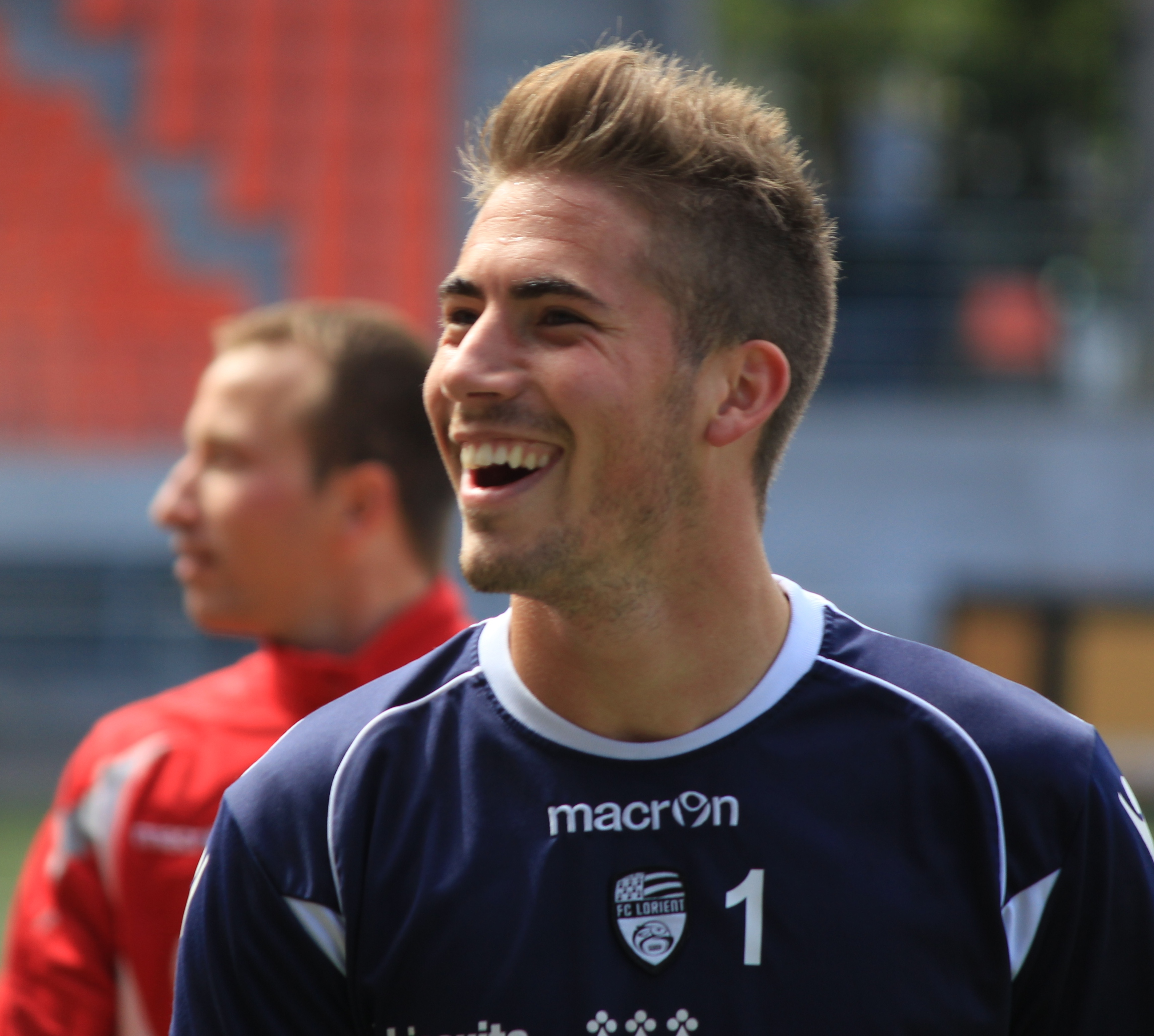 Lecomte pendant un entrainement du FC Lorient le 24 mai 2013